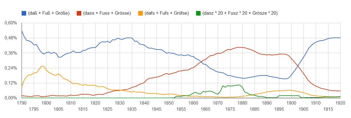 Fraktur und Antiqua und Ersatzschreibungen für das "ß" von 1790 bis 1920 mit den Daten von 2009 im Google Ngramm Viewer, anhand der Wörter "daß, Größe Fuß". Die OCR-Software erkennt zu dieser Zeit das lange s recht häufig falsch als "f", sonst korrekt als "s". Die sz-Schreibung ist wegen der Sichtbarkeit mit einem Multiplikator hervorgehoben.